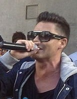 Dane Rumble.